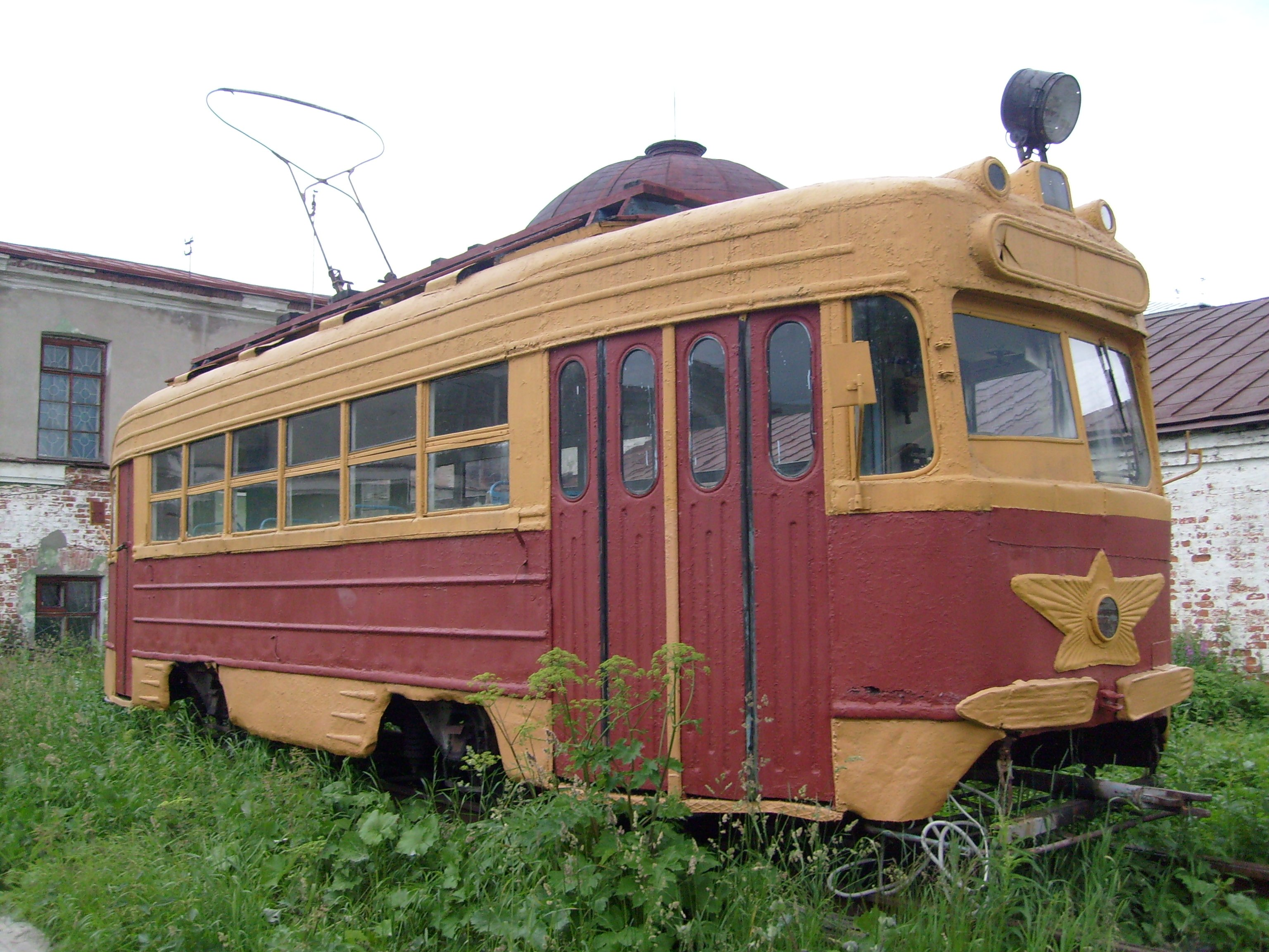 Памятник Архангельскому трамваю у Гостинных Дворов, модель КТМ1-8 1957 года выпуска.